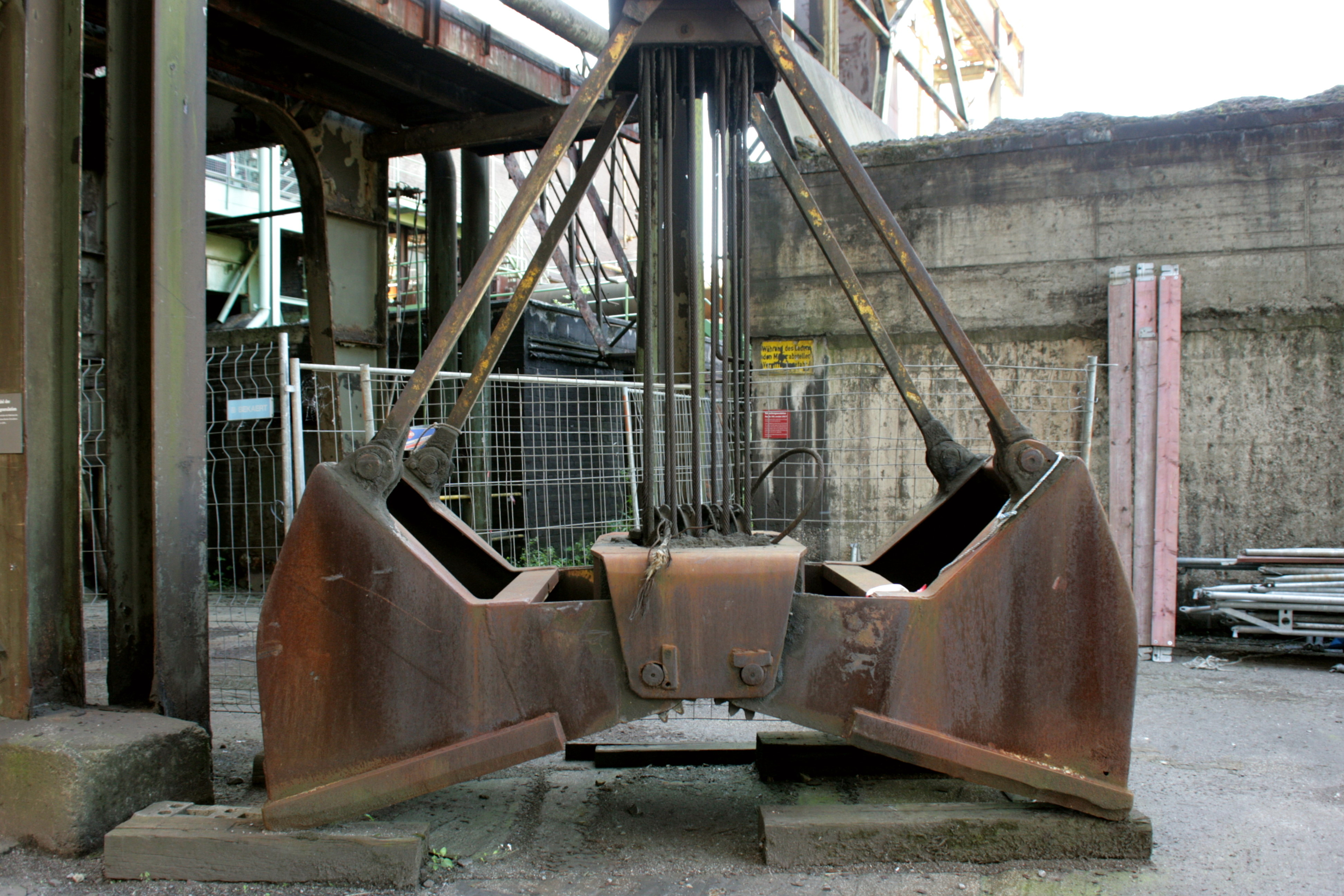 Hochofen 3 der Henrichshütte in Hattingen